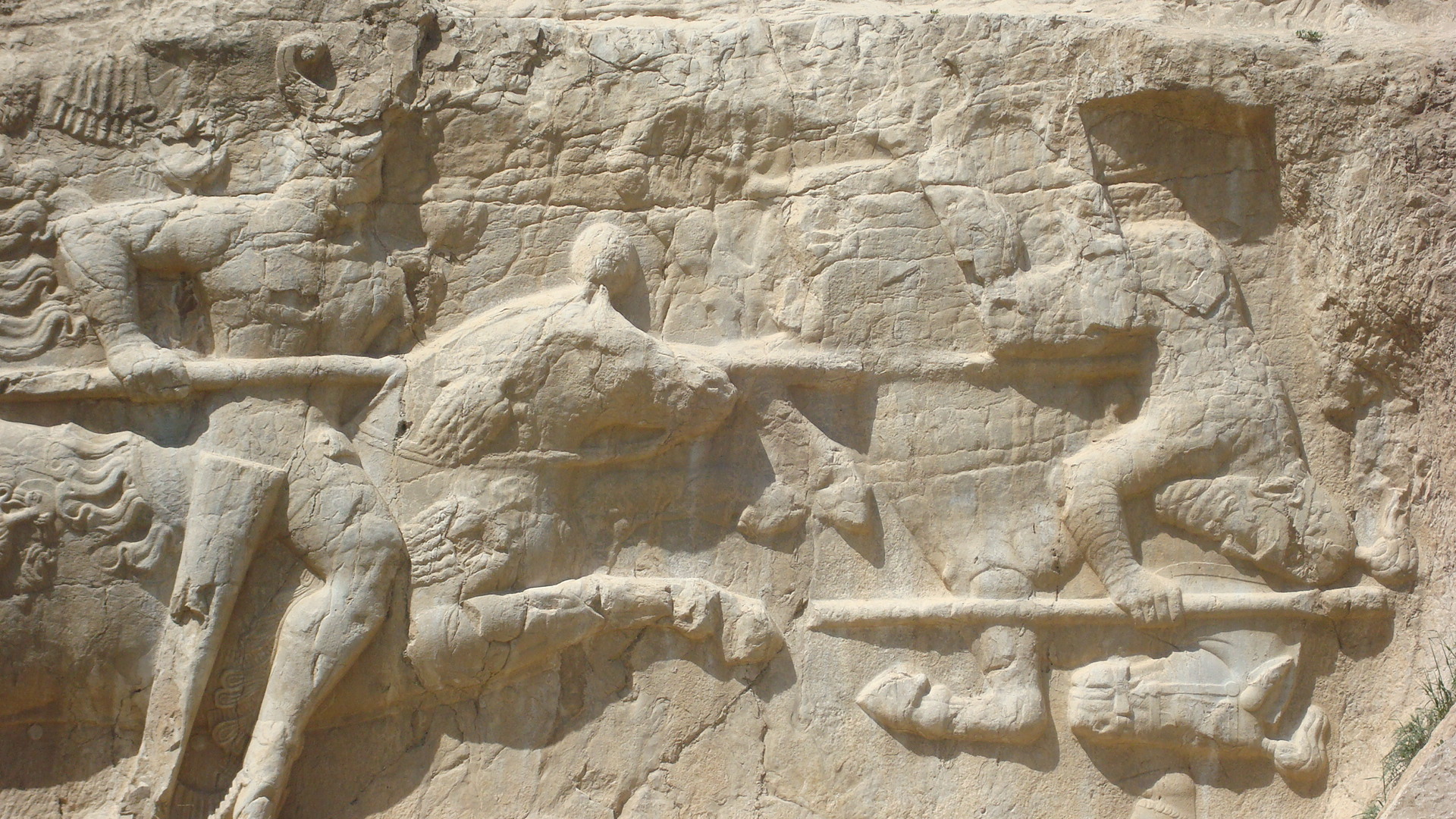 نقش رستم